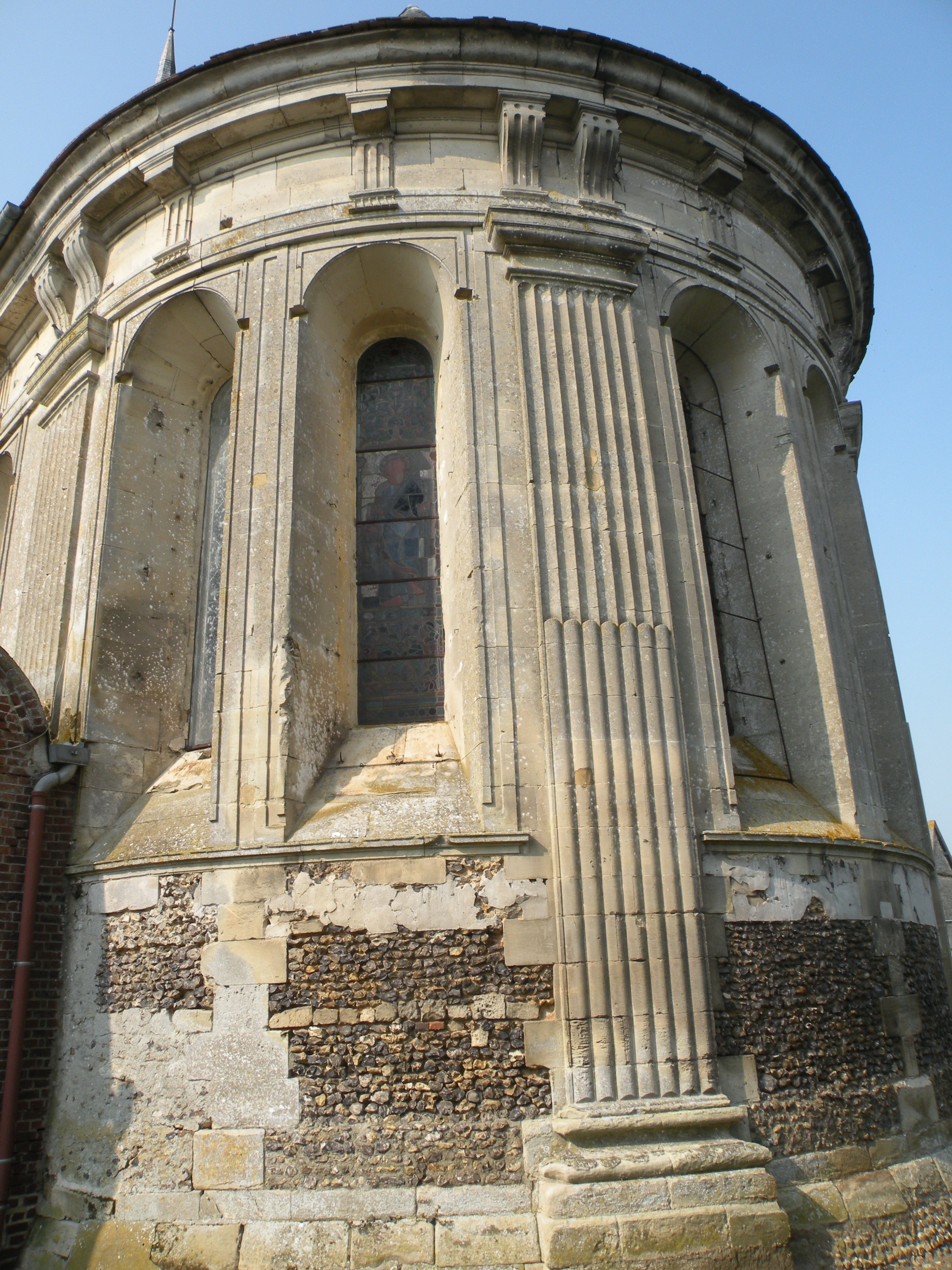 exterieur de l'Église Saint-Pierre et Saint-Paul de Jouy-sous-Thelle